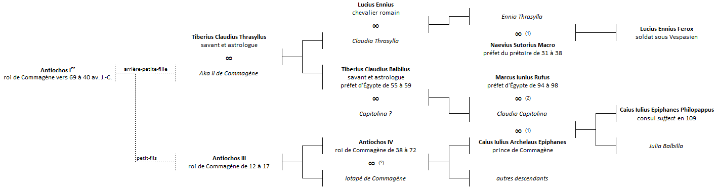 Famille de Claudius Balbillus et Julia Balbilla et connexion avec la dynastie des princes de Commagène de l'époque des Julio-Claudiens aux Antonins. Arbre non exhaustif.